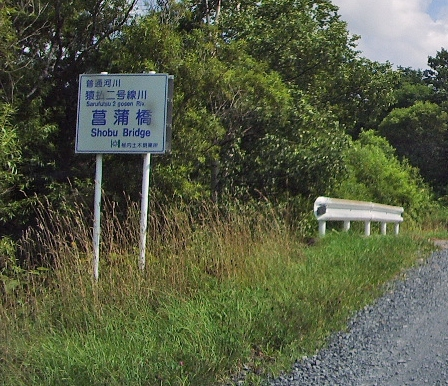 道道732号上猿払浅茅野線の橋梁名表示